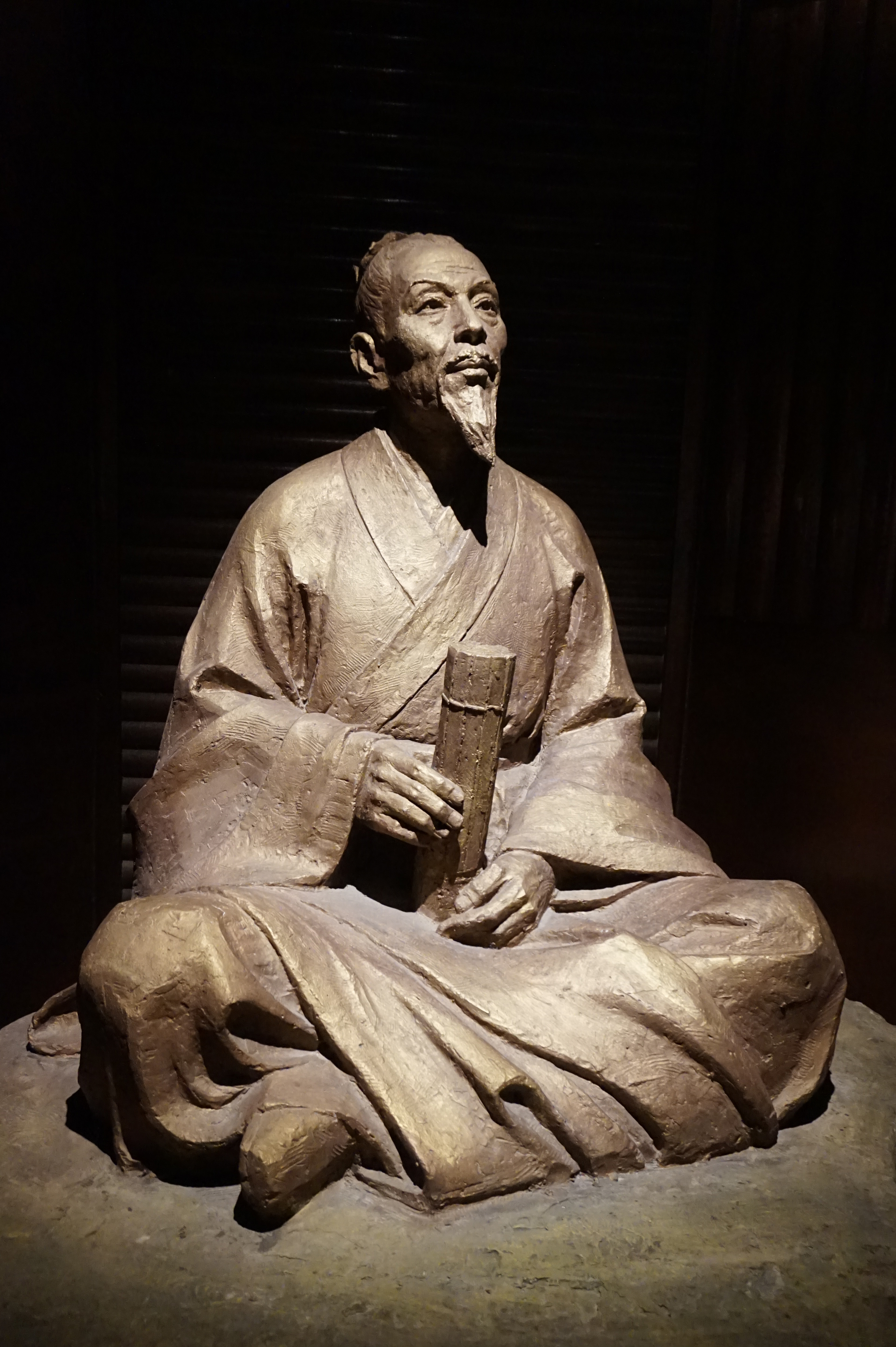 祖冲之铜像。